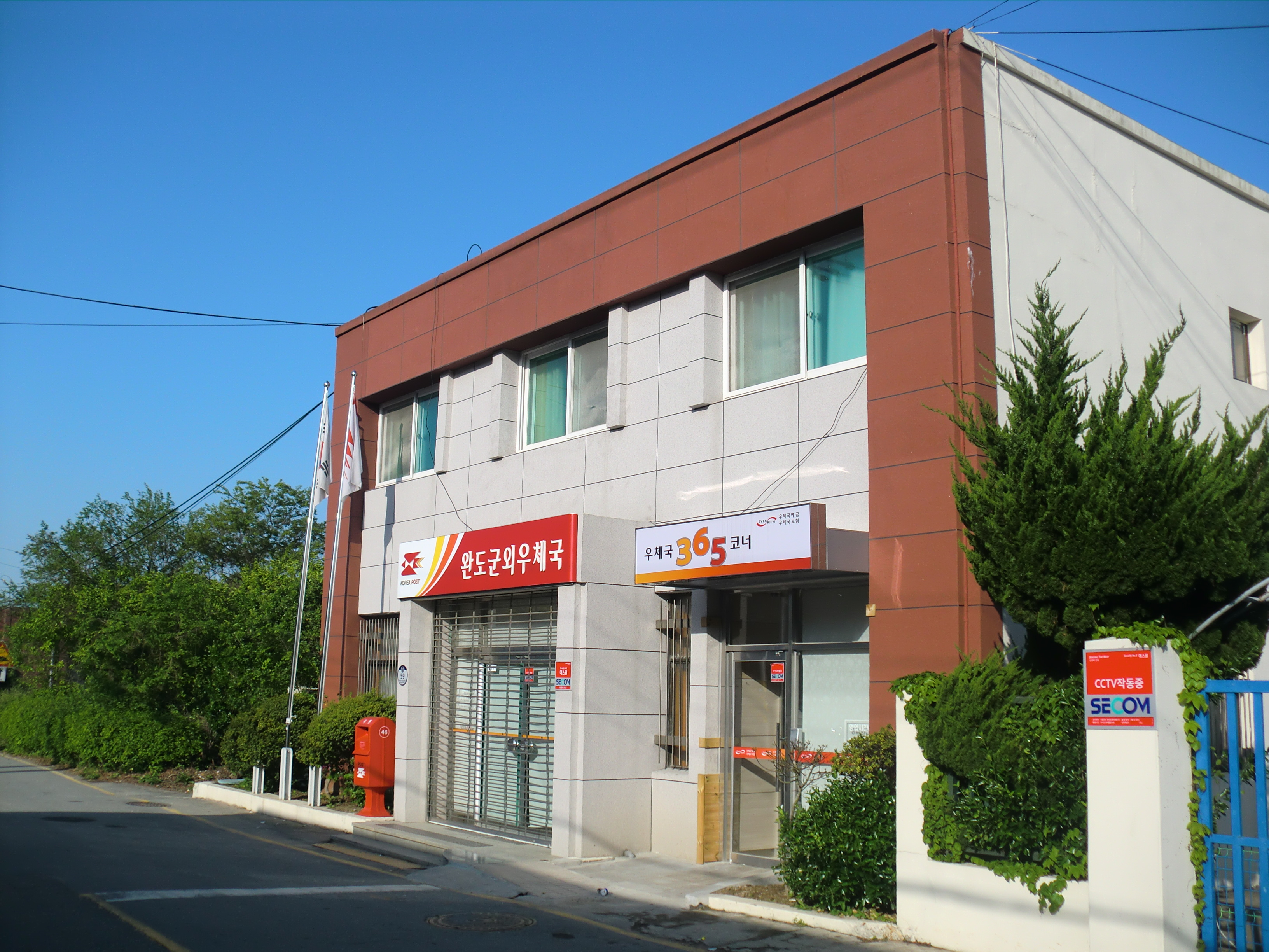 전라남도 완도군에 있는 완도군외우체국